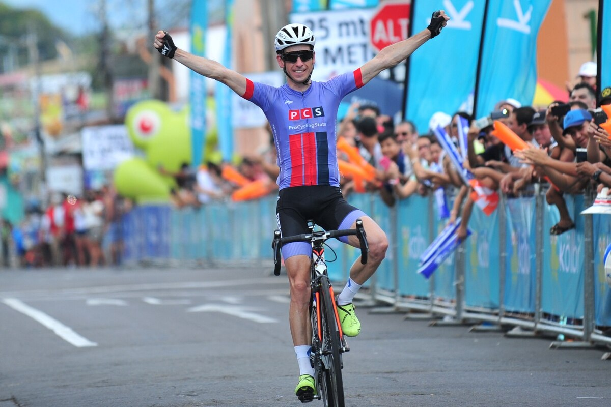 2e étape du Tour du Costa Rica 2019